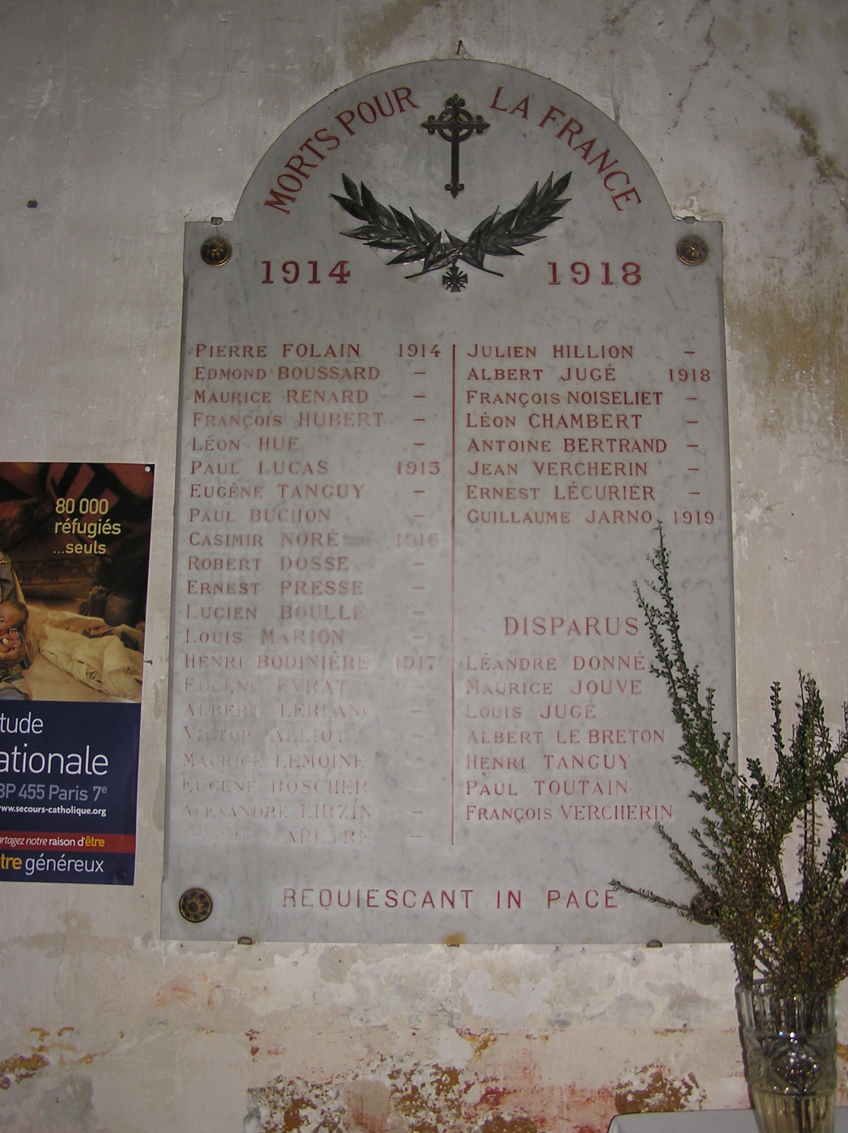 Plaque commémorative guerre 14 18 située dans l'Eglise de Guyancourt